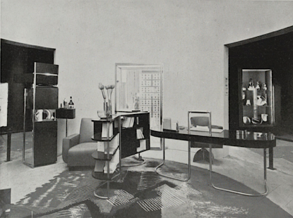 Guillemard Marcel, bureau moderniste